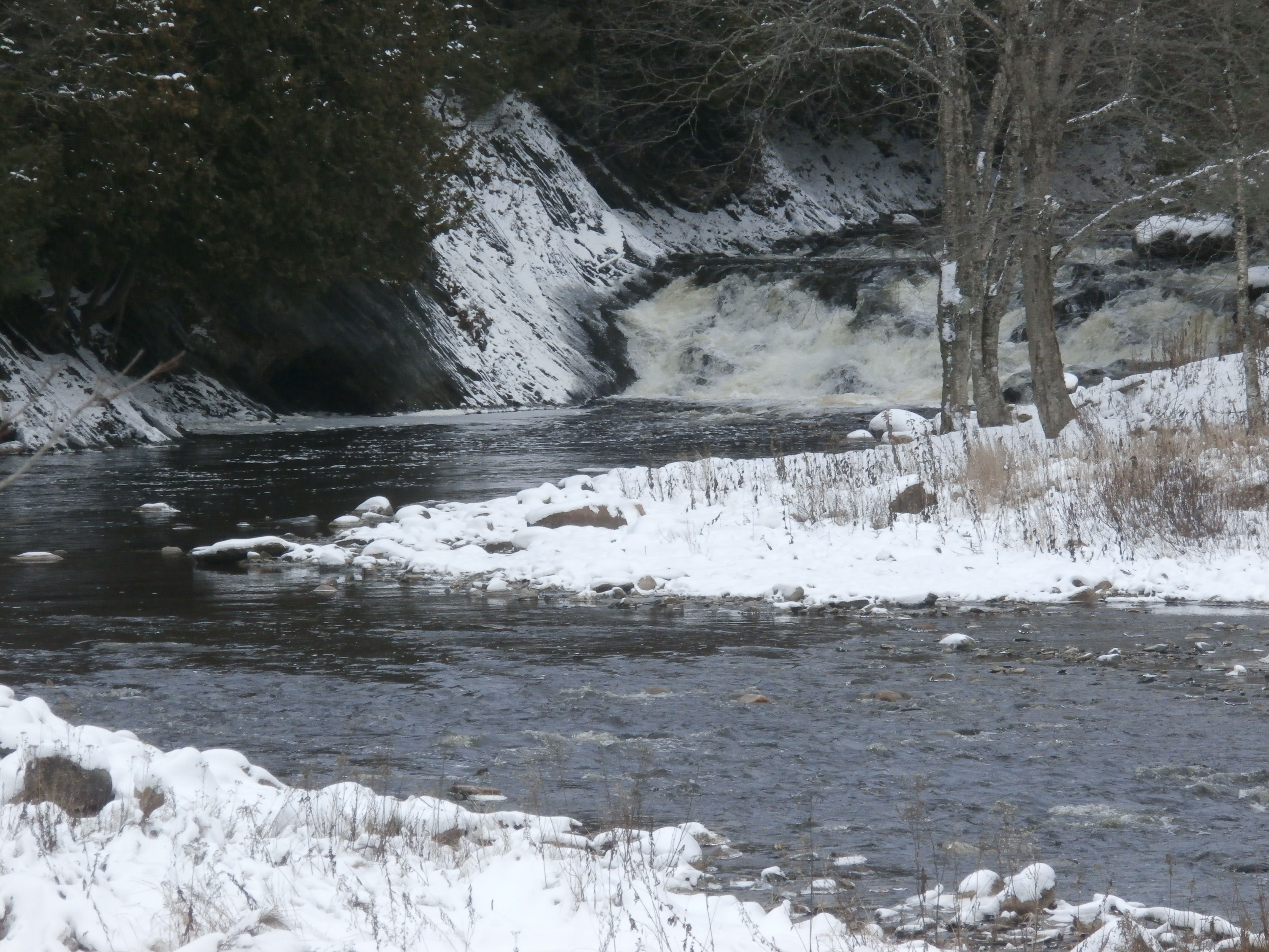 Rivière Rouge en amont du pont du chemin de Fontainebleau.